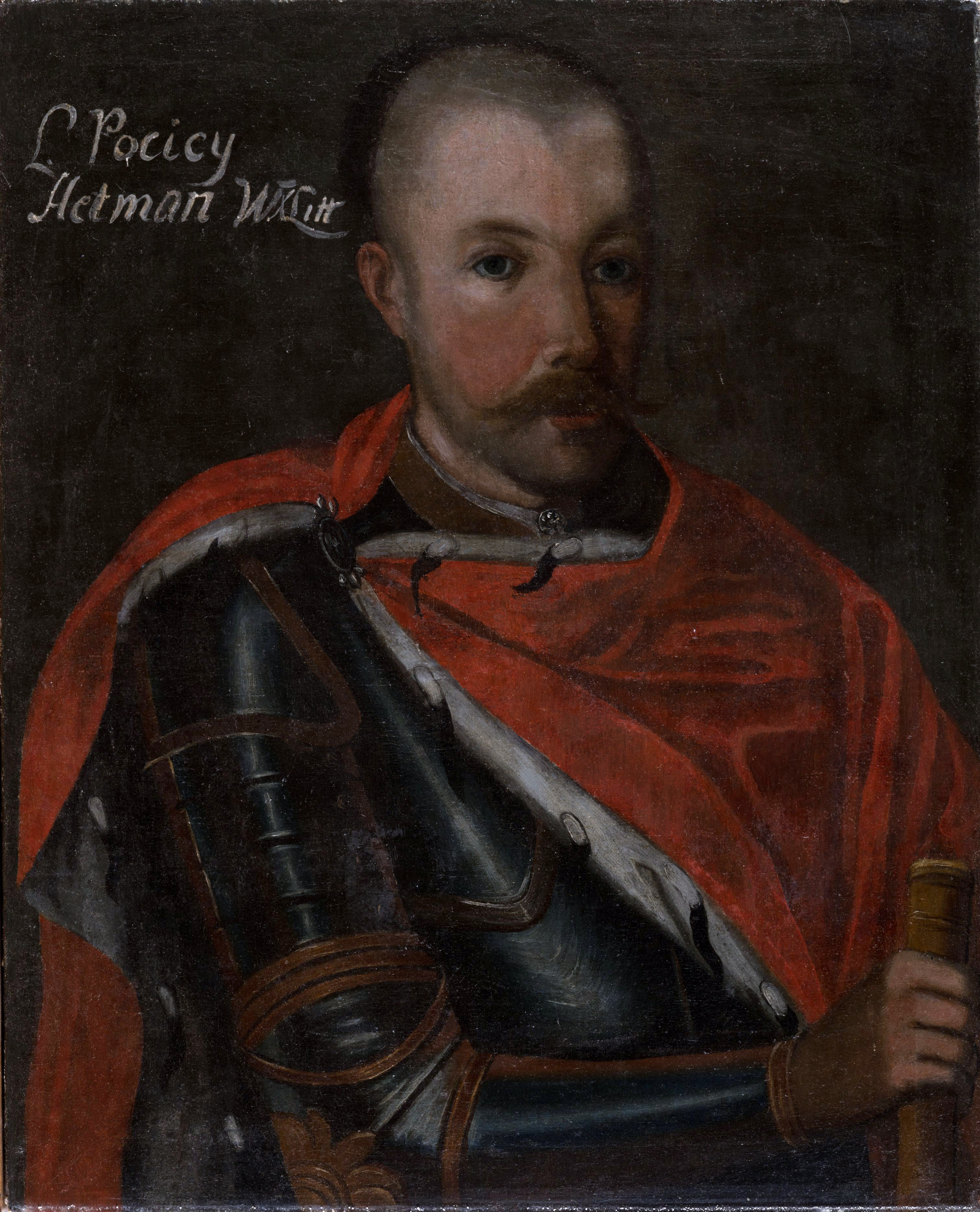 Беларуская (тарашкевіца): Партрэт Людвіка Канстантына Пацея (Ludvik Kanstantyn Paciej)